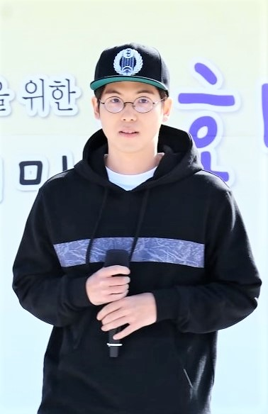 150425 광명 걷기대회